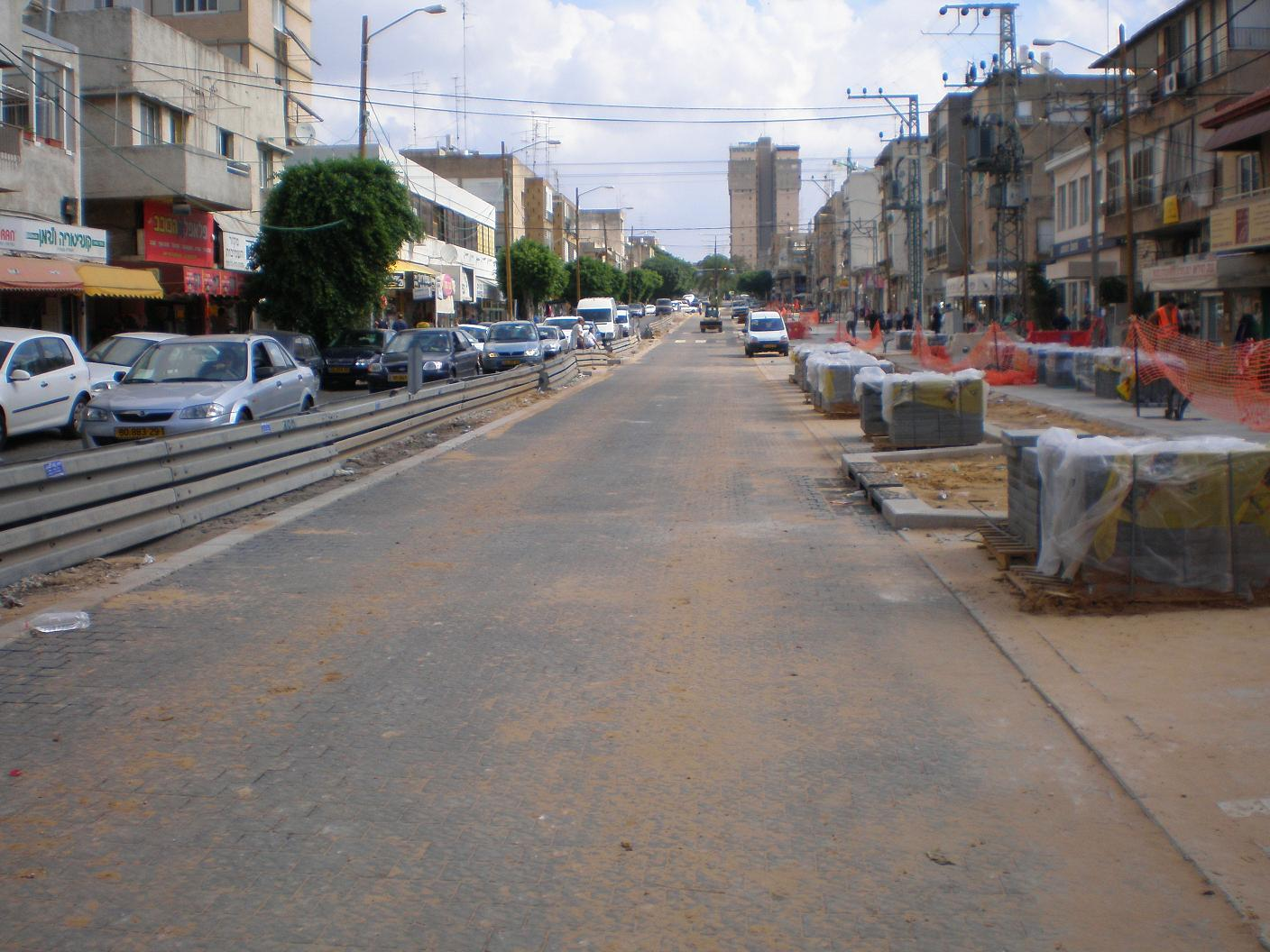 רחוב סוקולוב בהרצליה, במהלך הפיכתו למדרחוב, 27.10.2006. צילם דוד שי